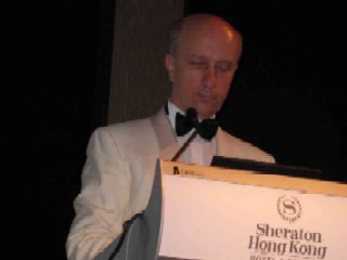 Prof. Adam W.Skorek